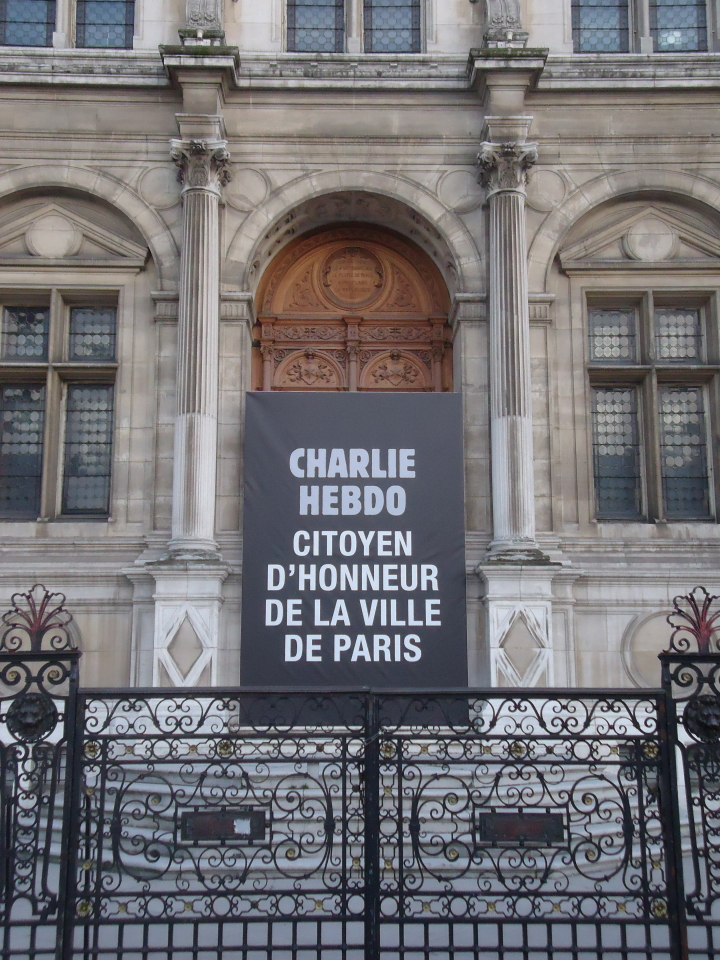 Charlie Hebdo citoyen d'honneur de la Ville de Paris, 2015